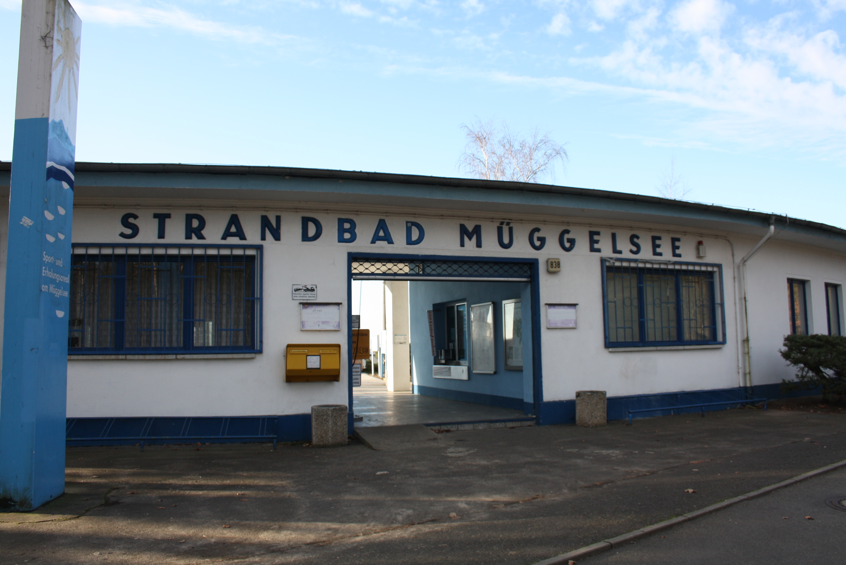 Strandbad EingangThis is a photograph of an architectural monument.